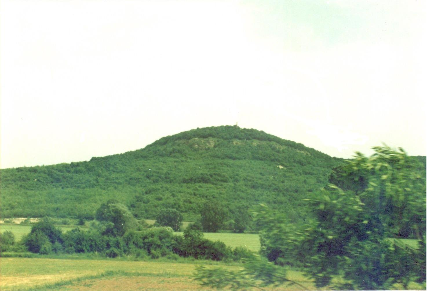 Хълмът Керчан баир до село Априлово (Араплар) - мястото на последната битка на четата на Таньо Войвода.